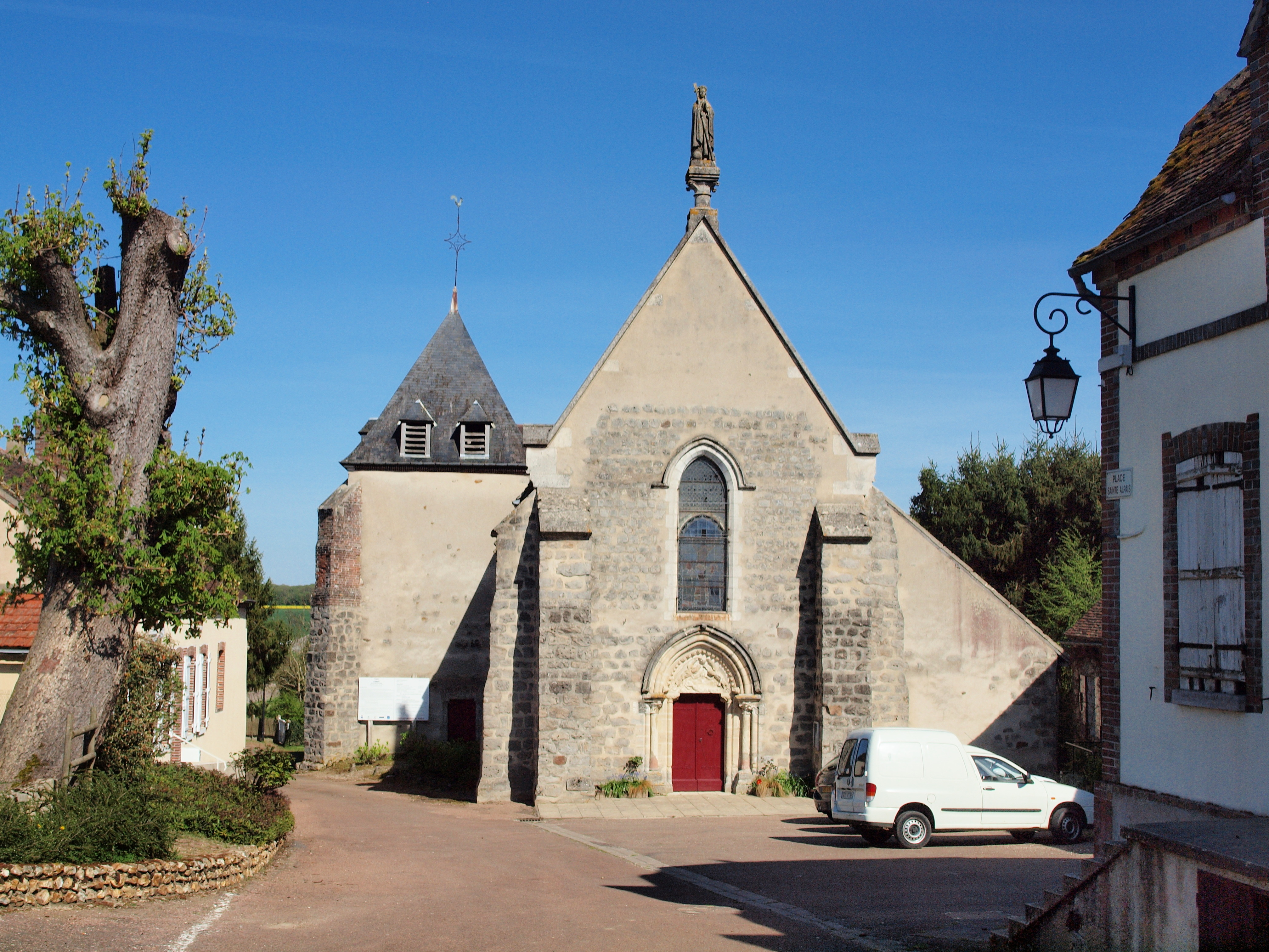 Église de l'Assomption de Cudot (Yonne, France)